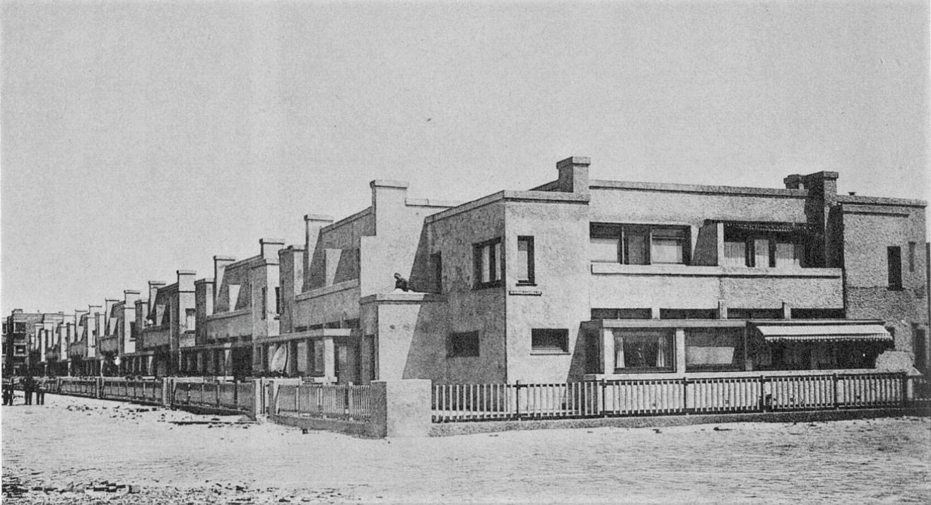 Jan Wils, habitation, La Haye, 1919-1921 (image du domaine public modifiée)